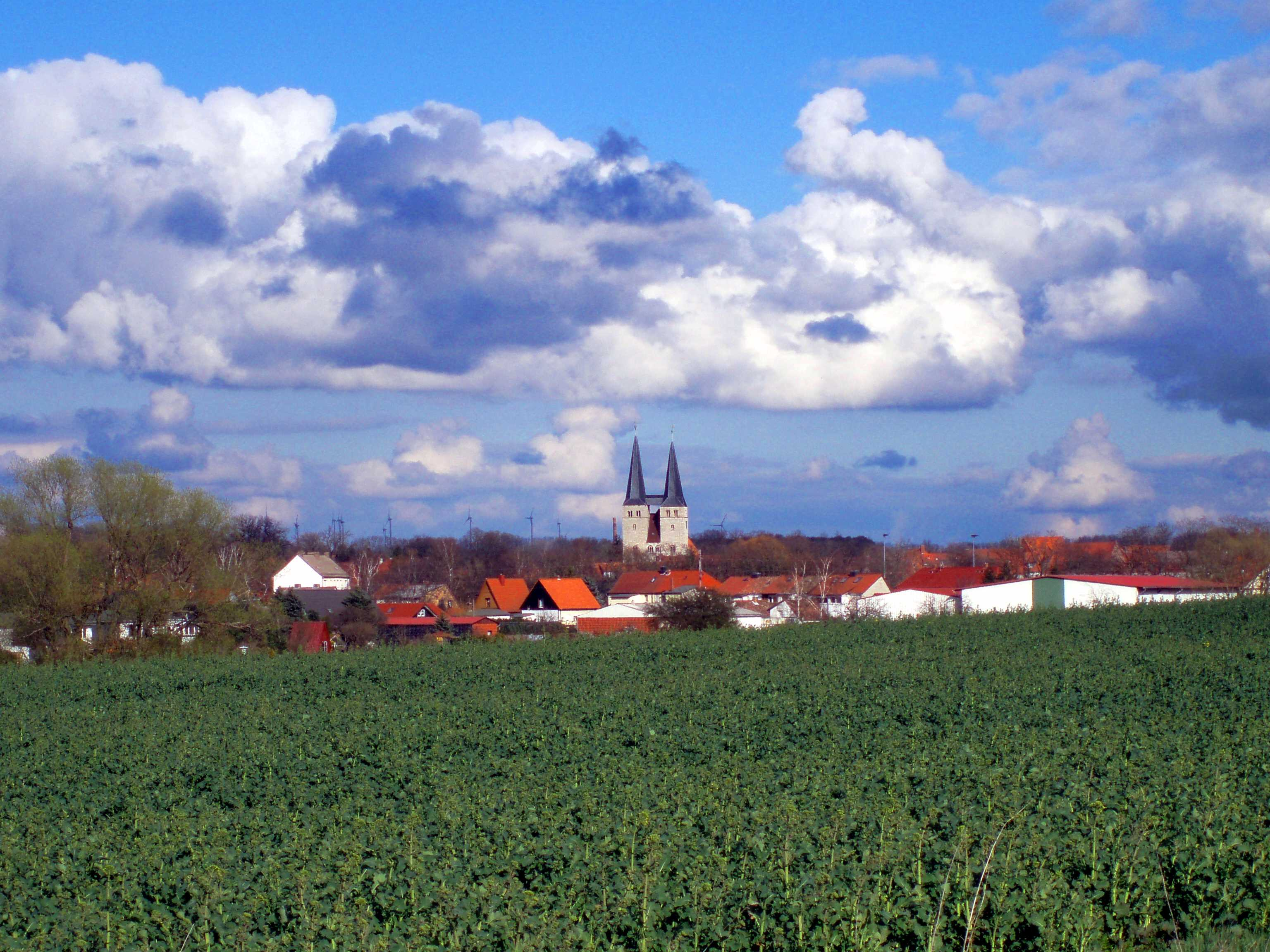 Blick auf Osterwieck, Sachsen-Anhalt, Deutschland